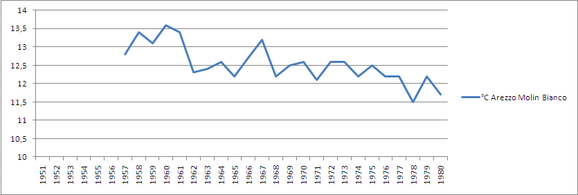 Stazione meteorologica di Arezzo Molin Bianco: andamento della temperatura media annua dal 1951 al 1980